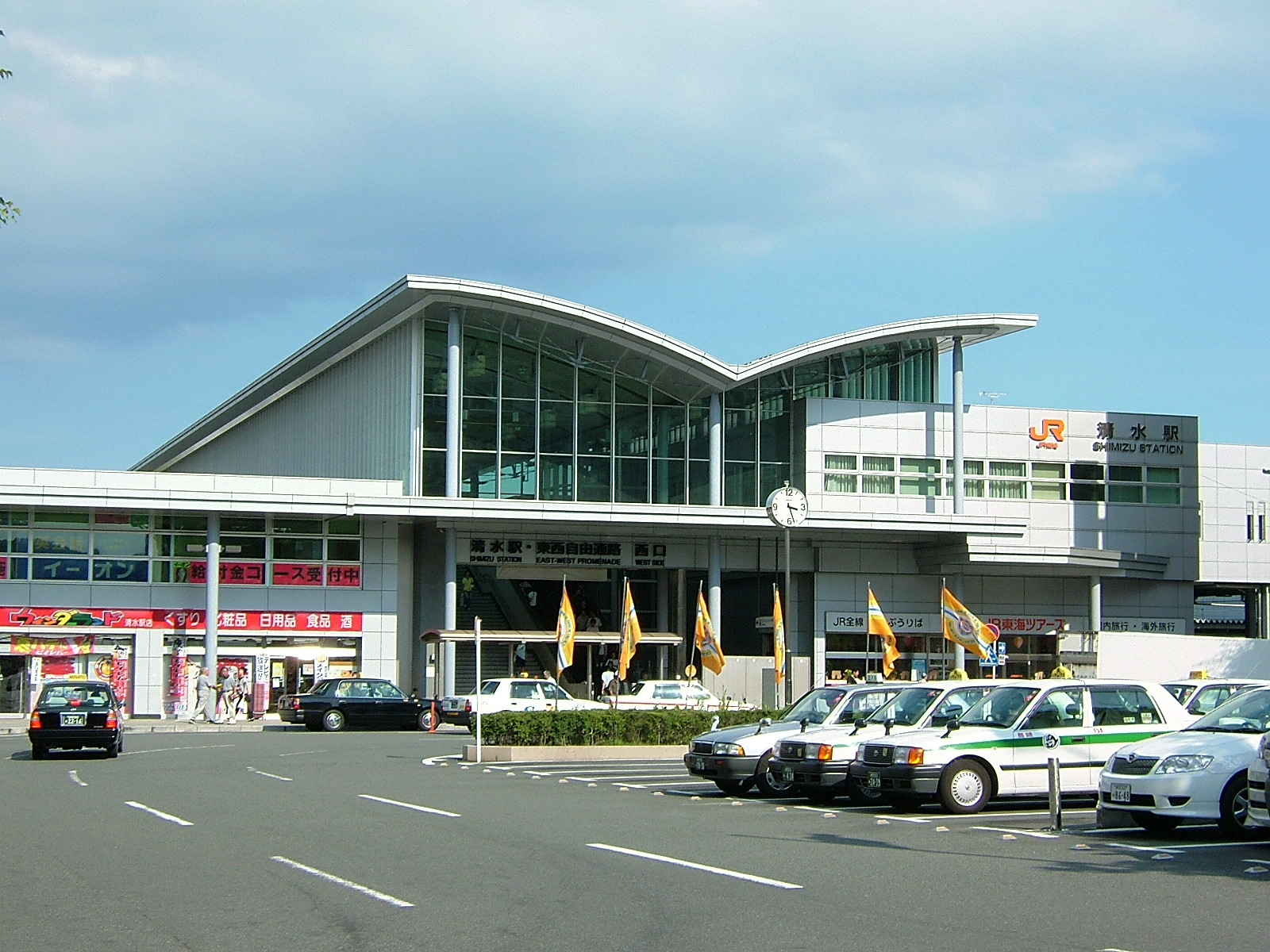 駅前広場から見た東海道本線清水駅西口